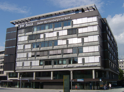 Filiale der Baden-Württembergischen Bank (BW-Bank) am Kleinen Schlossplatz, Stuttgart, Germany